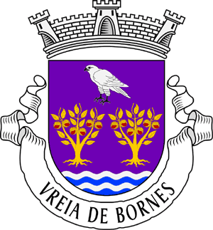 Brasão da freguesia de Vreia de Bornes (concelho de Vila Pouca de Aguiar)